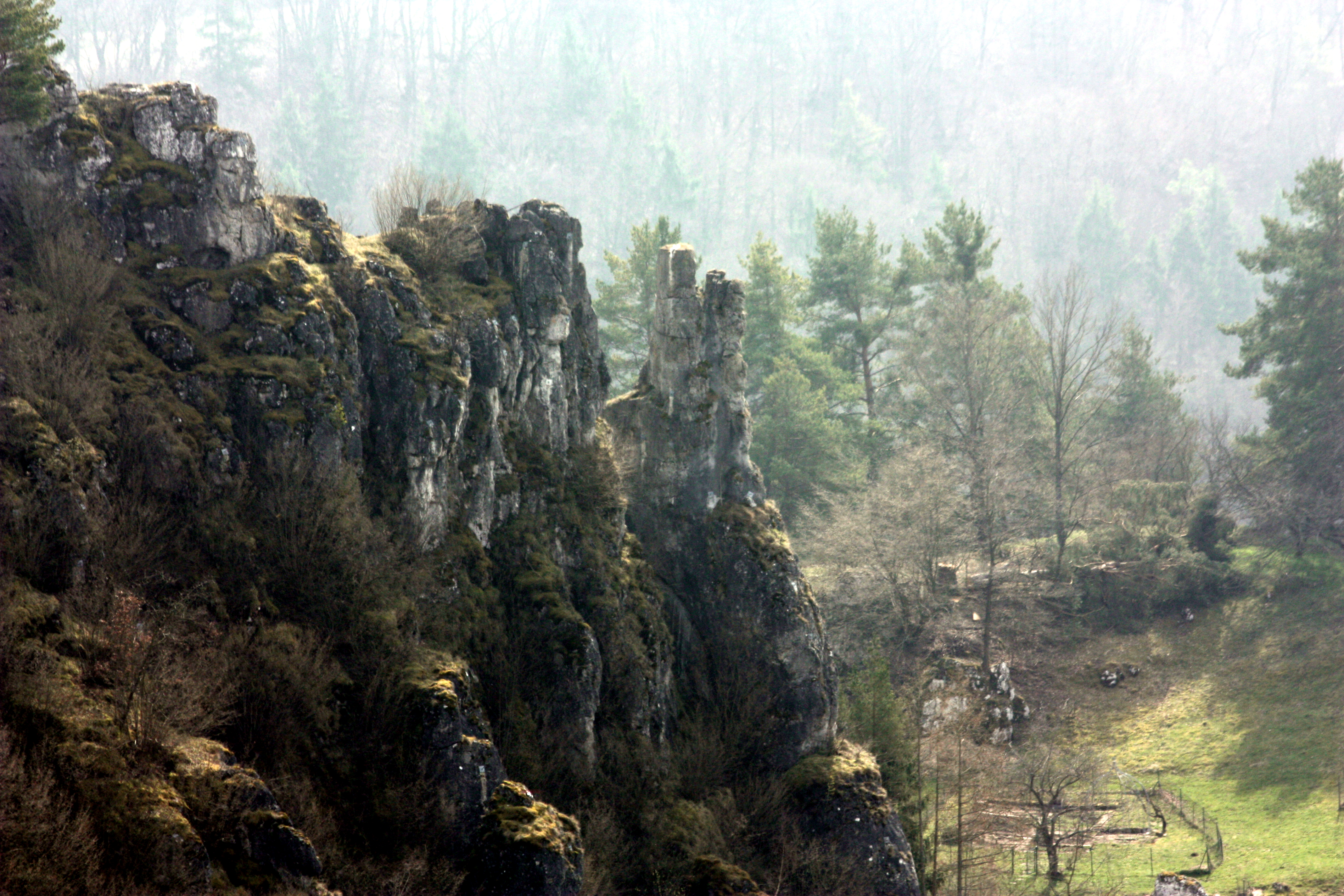 Geotop Landkreis Regensburg Felshang W von Schönhofen Objektnr. 375A010